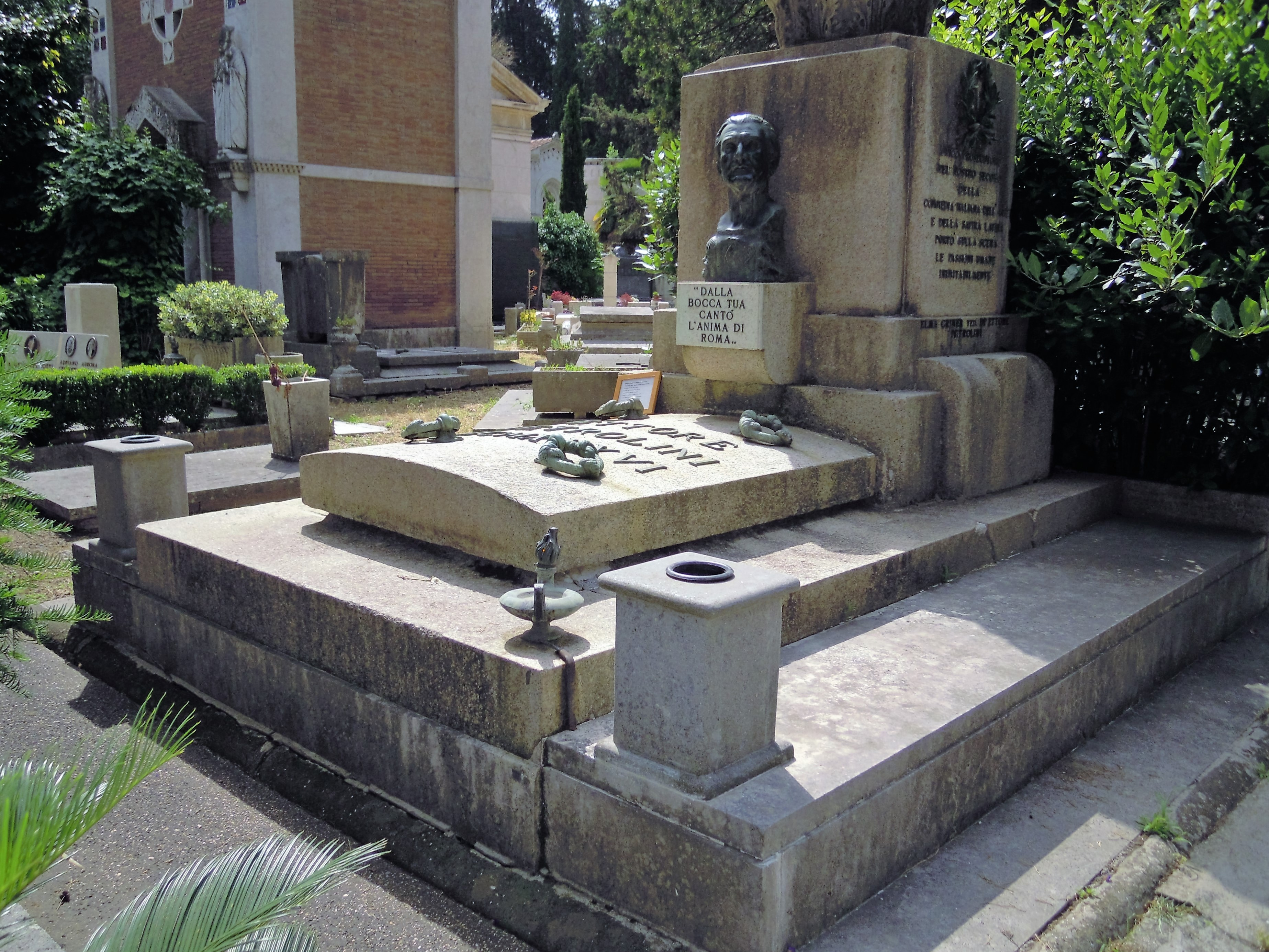 Roma, cimitero del Verano: tomba di Ettore Petrolini, ricostruita dopo i danneggiamenti del bombardamento del 19 luglio 1943